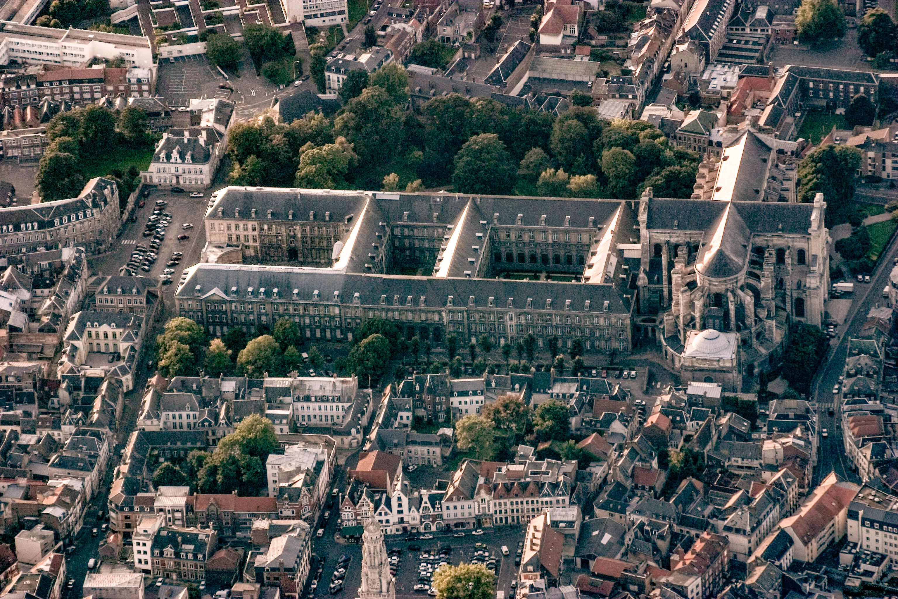 photo personnelle